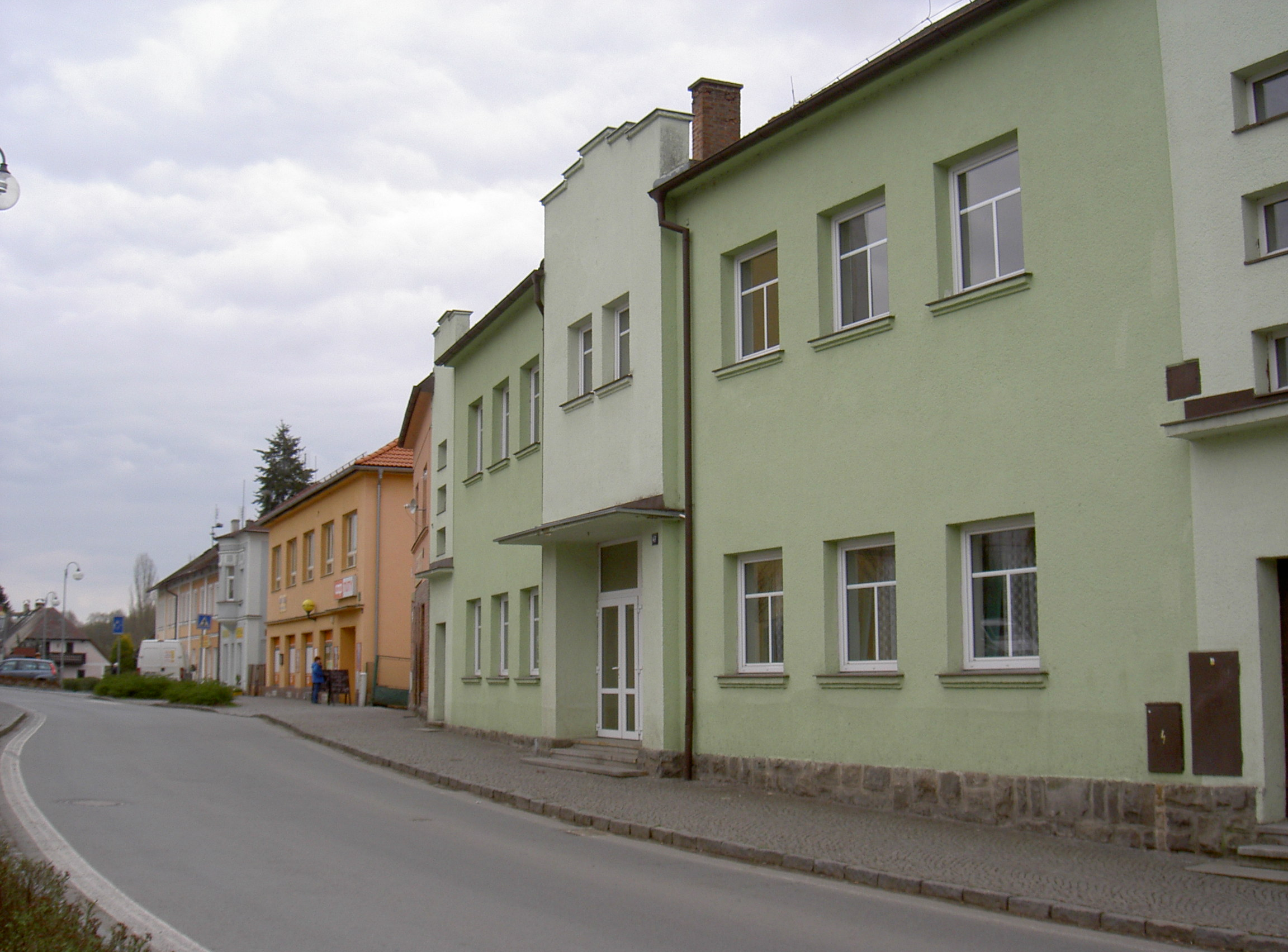 Bělá nad Radbuzou